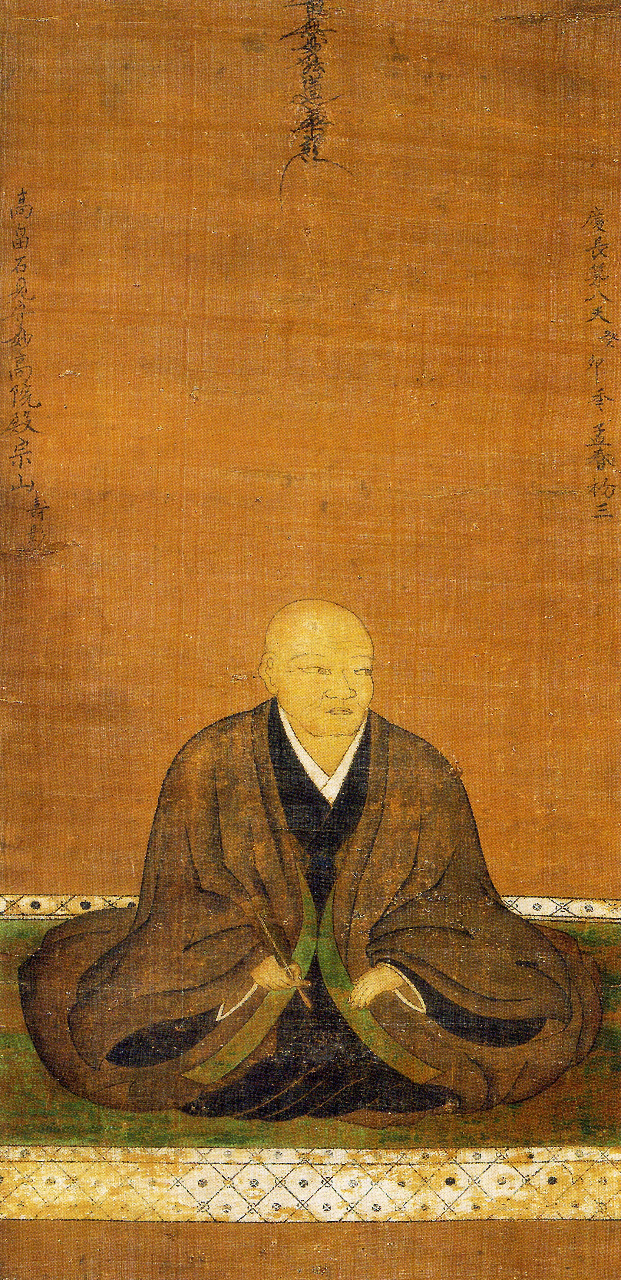 高畠定吉の肖像。